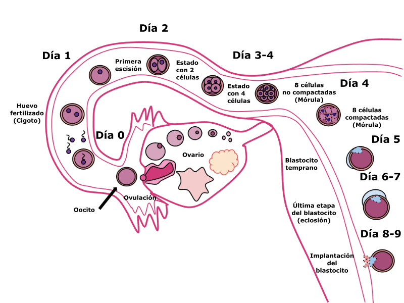 Diagrama de la fertilización humana